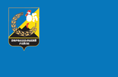 Прапор Перевальського району